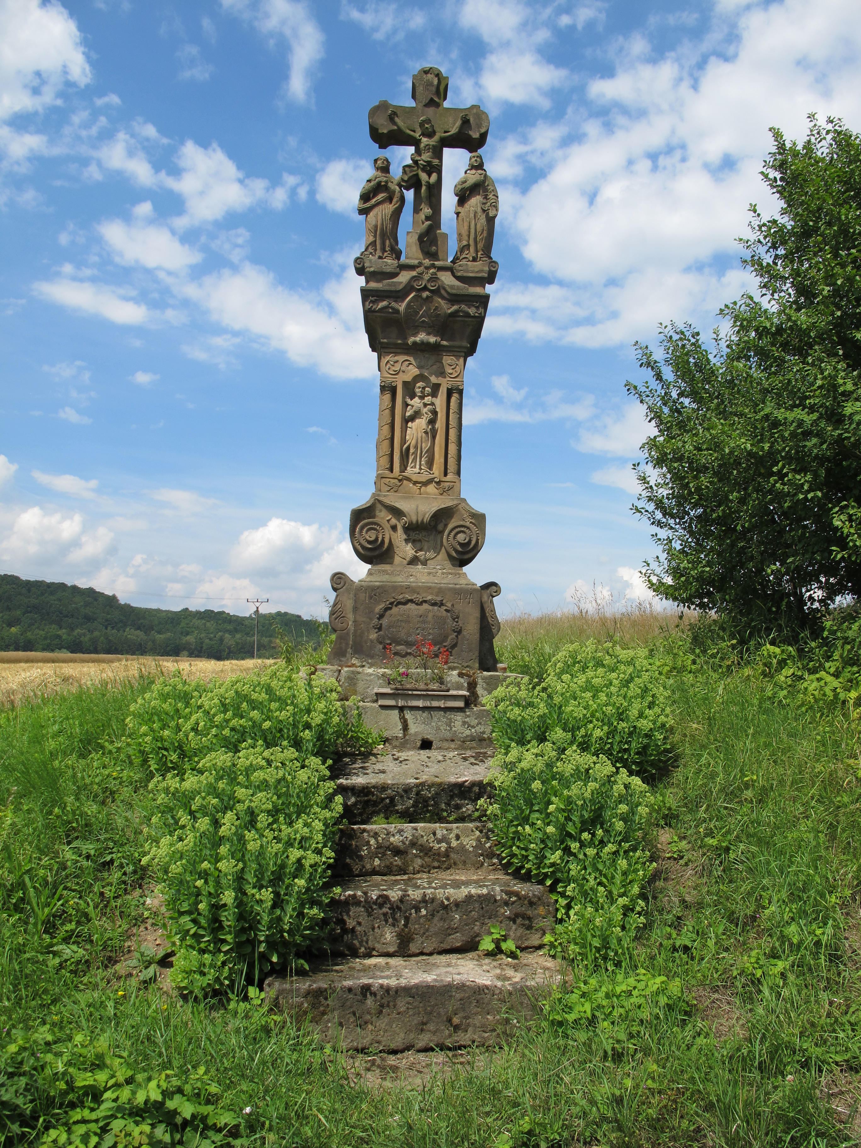 Sloup se sousoším Kalvárie, Sýkořice (Žernov).